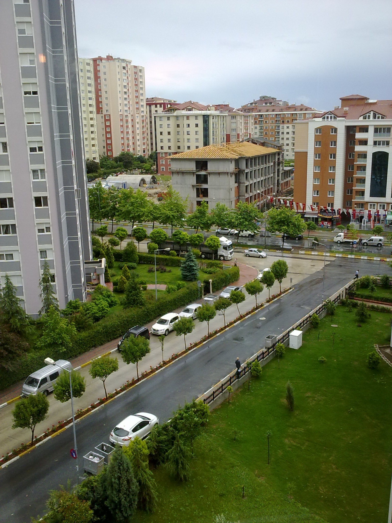 beylikdüzü adnan kahveci mahallesi